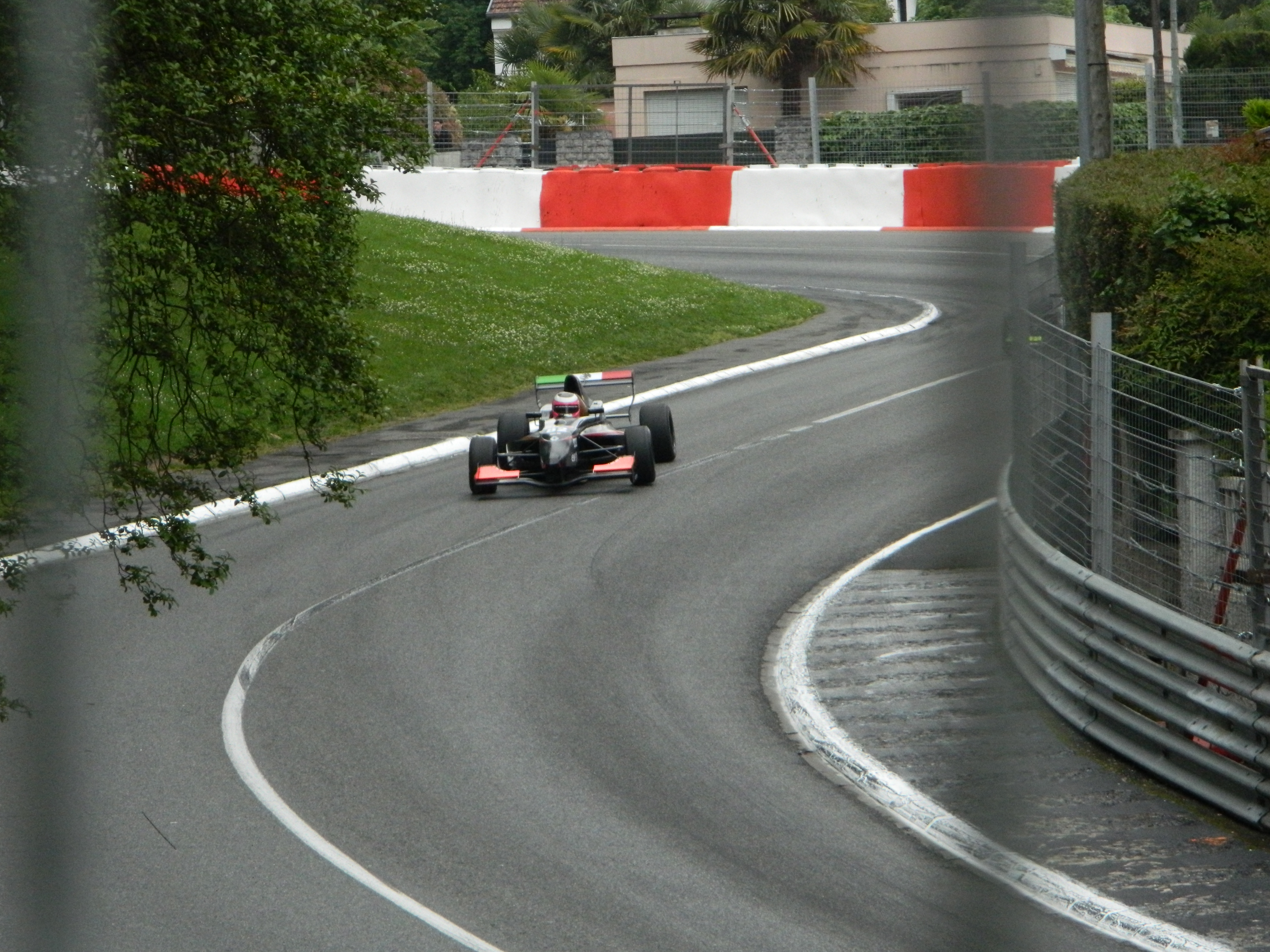 Luis Michael Dorrbecker au Grand Prix de Pau 2012 sur Formule Renault 2.0 ALPS.